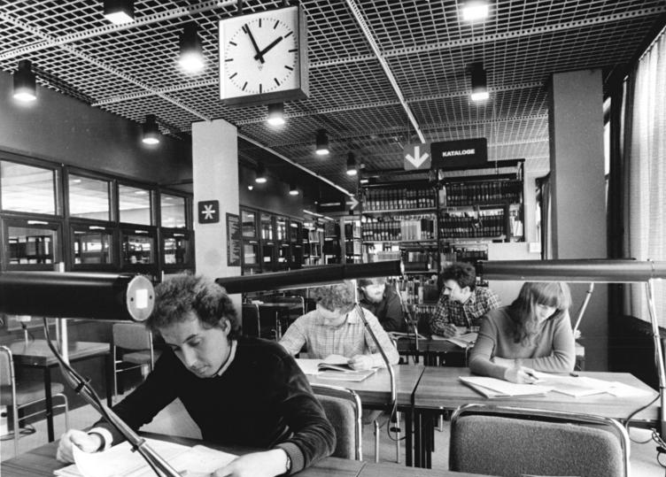 Mittweida, Ingenieurhochschule, Lesesaal ADN-ZB Thieme 4.4.85 Bez.Karl-Marx-Stadt: Praxisbezogene Forschung-An der Ingenieurhochschule Mittweida gibt es gegenwärtig vier Komplexverträge mit den Kombinaten für Nachrichtentechnik, Mikroelektronik, Robotron und dem Kombinat Rundfunk-Fernsehen. Die Palette der praxisbezogenen Forschungsaufgaben reicht von der Entwicklung und Erprobung von Verfahren und Ausrüstungen im elektronischen Gerätebau bis zur rechnergestützen Konstruktion von Problemlösungen. Dabei werden von den Kombinaten konkrete Forderungen der Vorlauf-Forschung gestellt, die den Planzeitraum bis 1990 umfassen. In der neuen Bibliothek der Hochschule stehen den 700 Studenten etwa 70.000 Bände Fachliteratur zur Verfügung. - siehe auch 1985-0404-1N